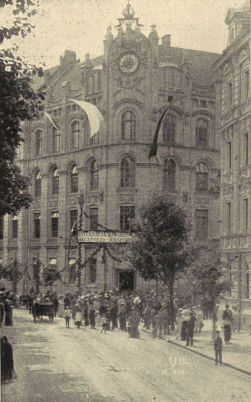 La kongresejo de la Universala Kongreso 1912 en Krakovo